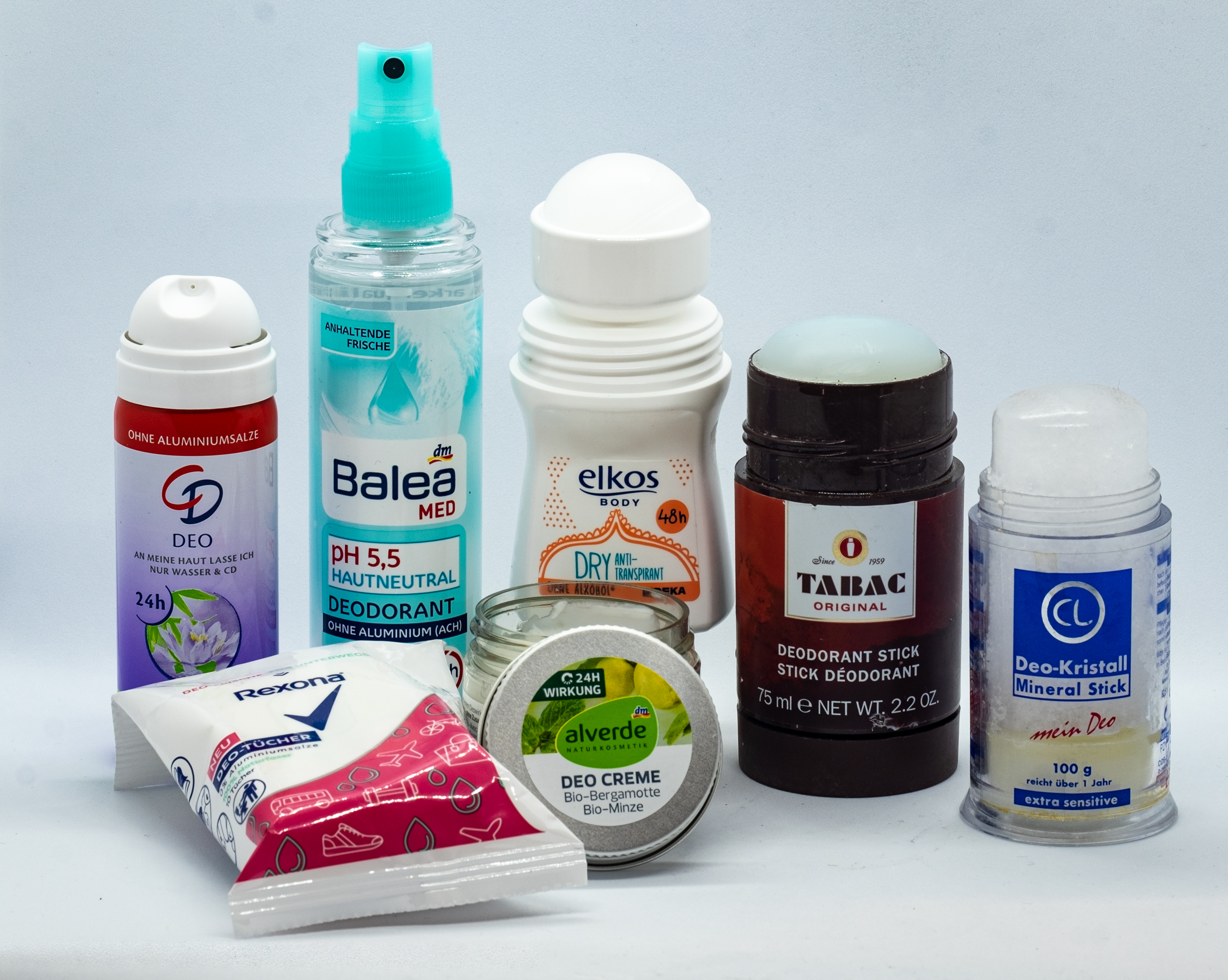 Deodorants, Auswahl nach Form und Farbe